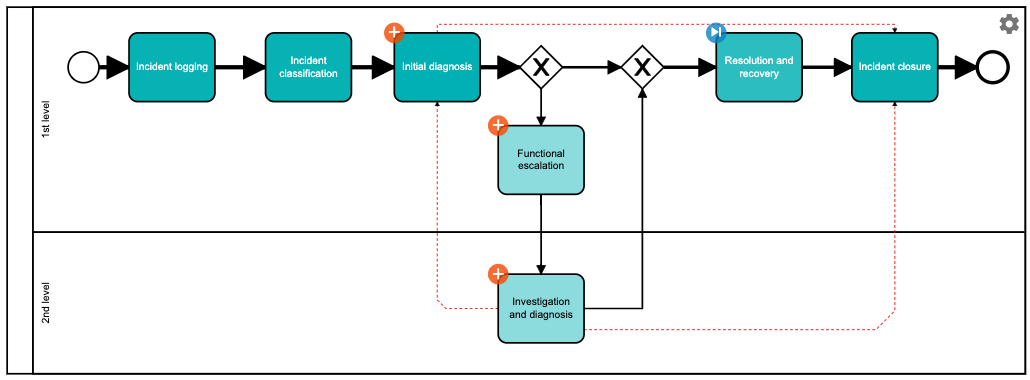 Darstellung von Abweichung im Prozess Modell in LANA Process Mining